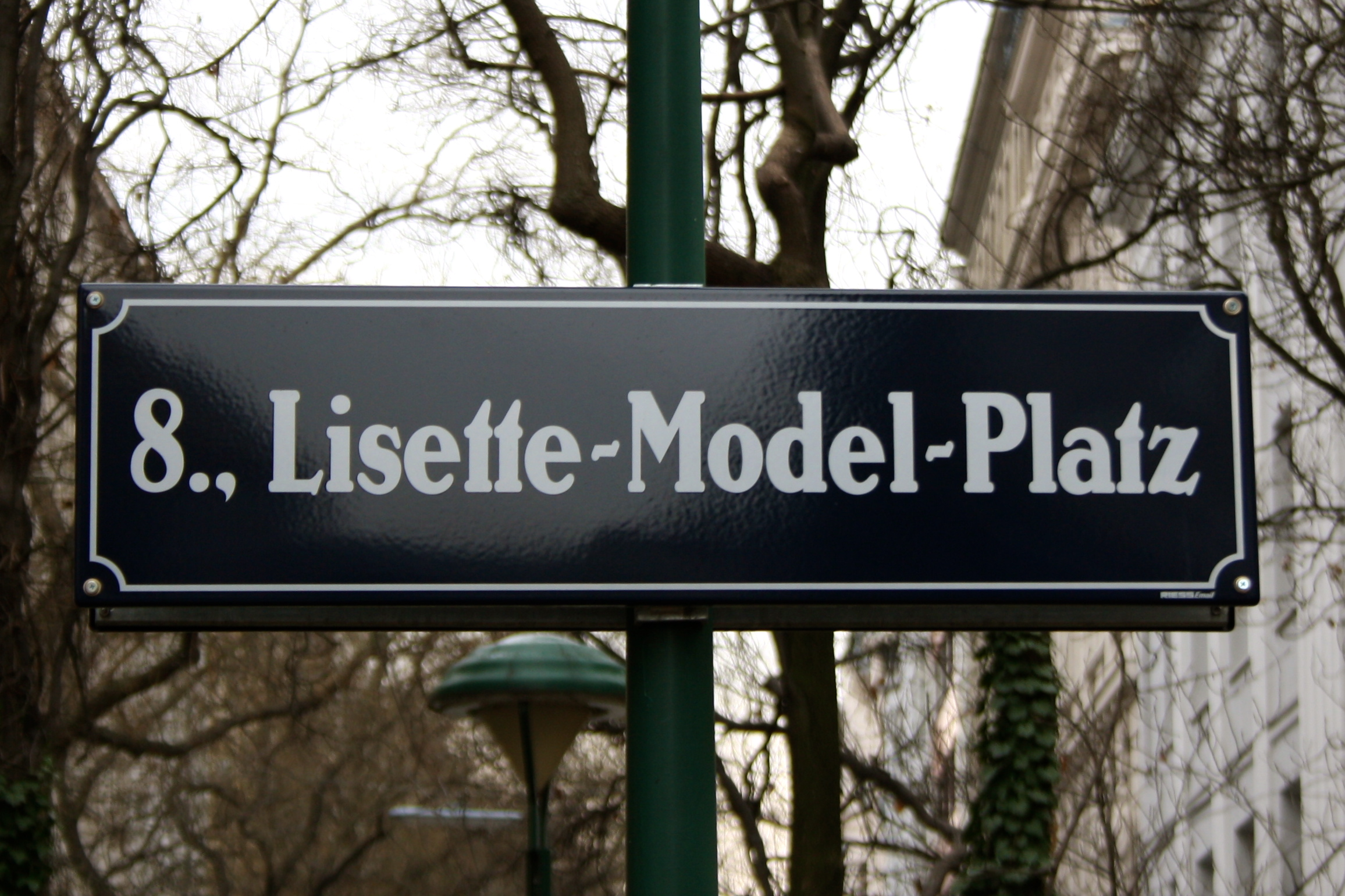 Straßenschild Lisette-Model-Platz, Wien-Josefstadt.